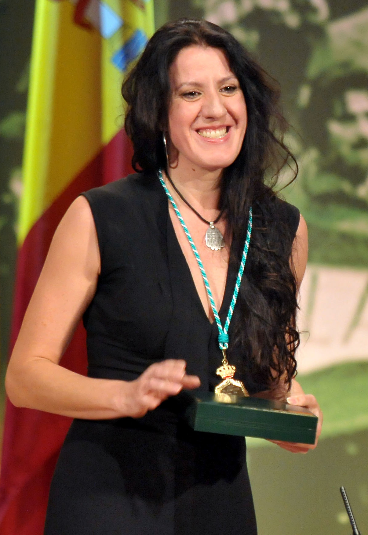 La bailaora y coreógrafa María Pagés recibe la Medalla de Andalucía de manos del presidente andaluz, José Antonio Griñán.